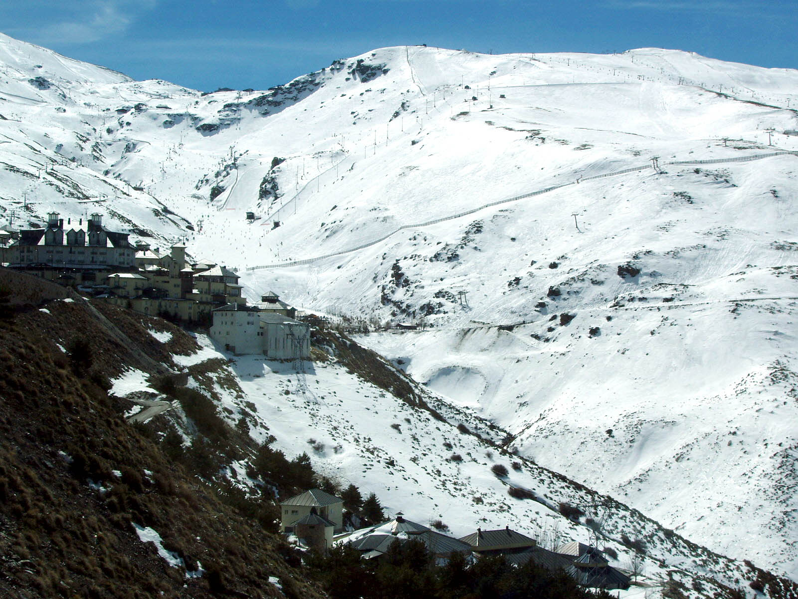 Estación de esquí de Sierra Nevada, en Pradollano, término municipal de Monachil (Granada, España).